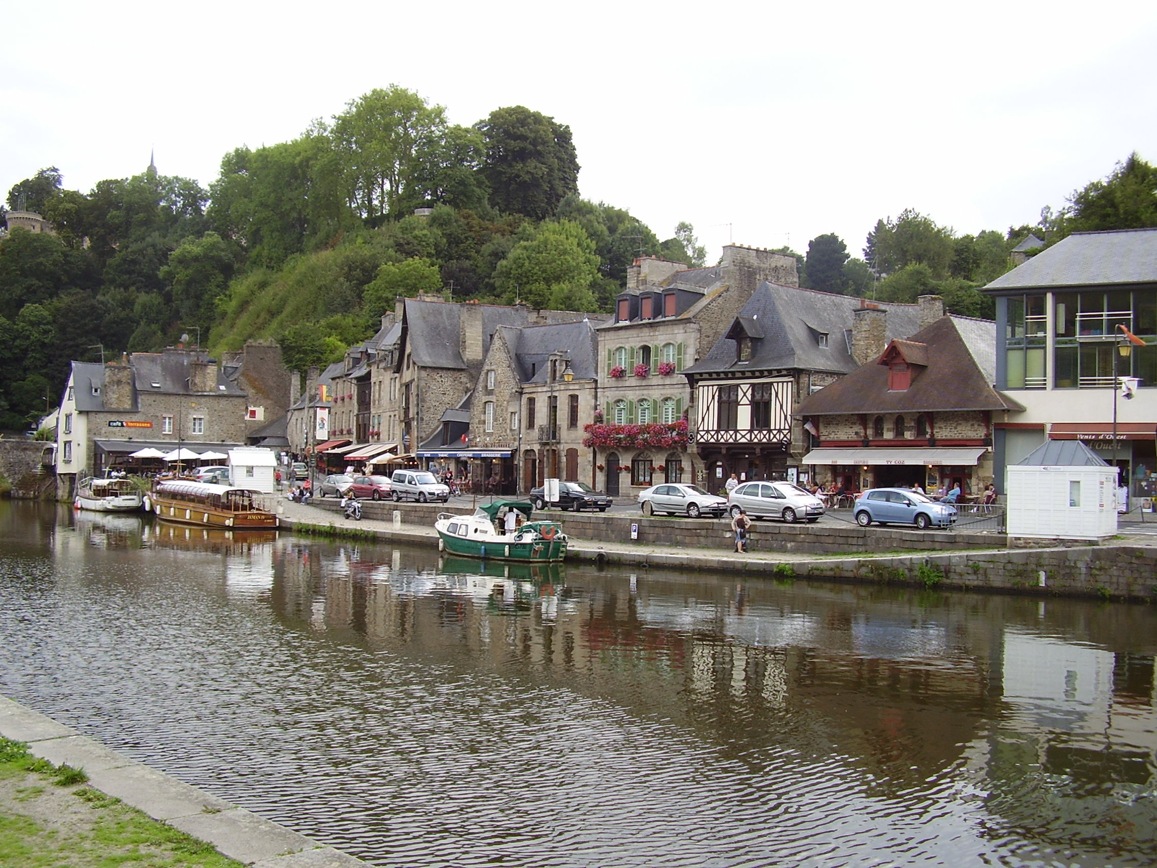 Dinan, Frankreich